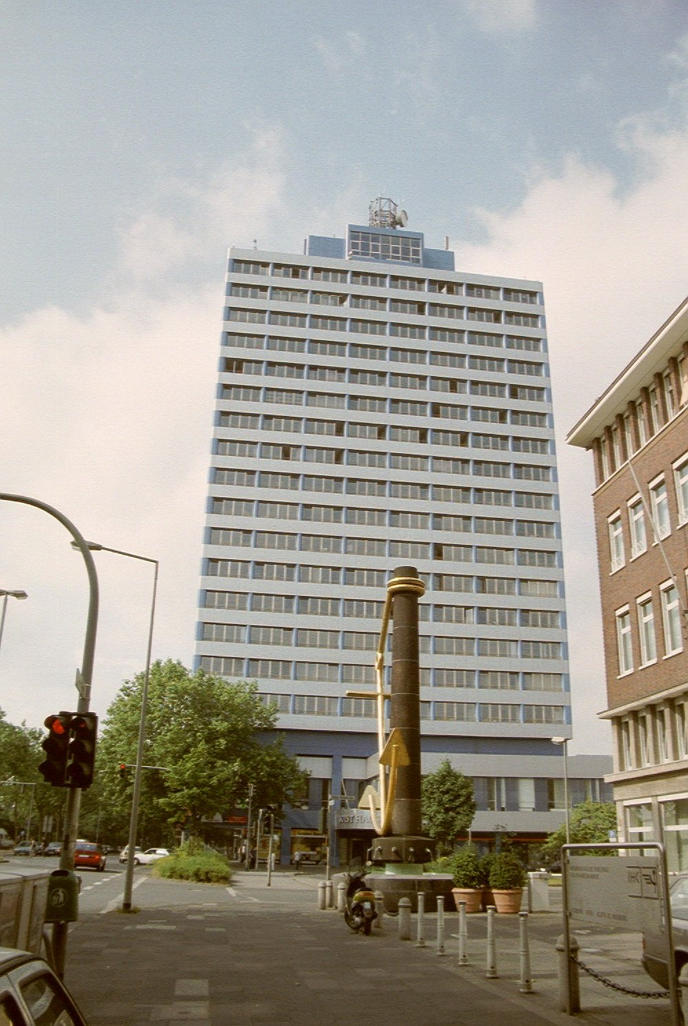 Hoisthaus Duisburg, Fr.-Wilhelm-Str.96, 47051 Duisburg